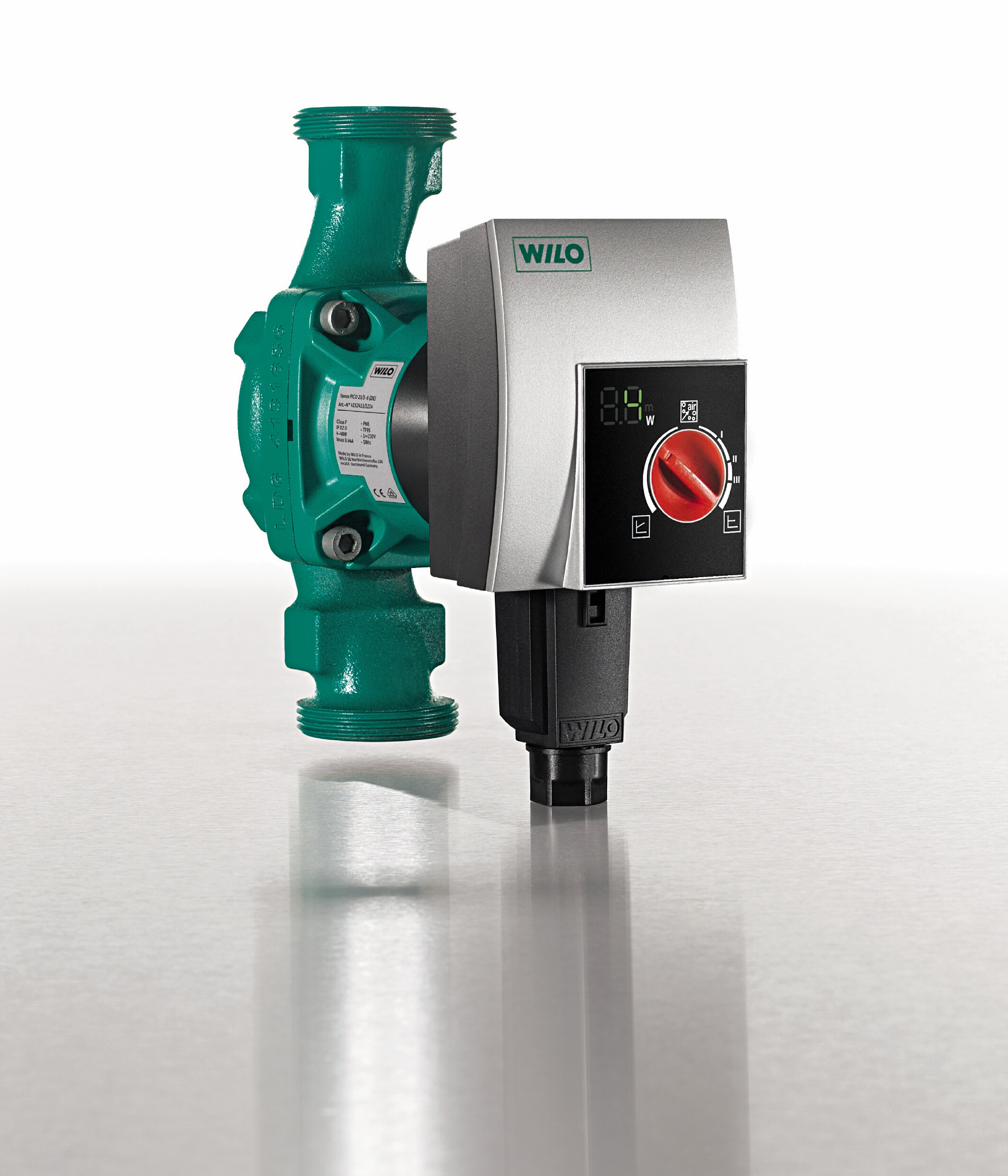 Standardowa energooszczędna pompa obiegowa Wilo-Yonos PICO.